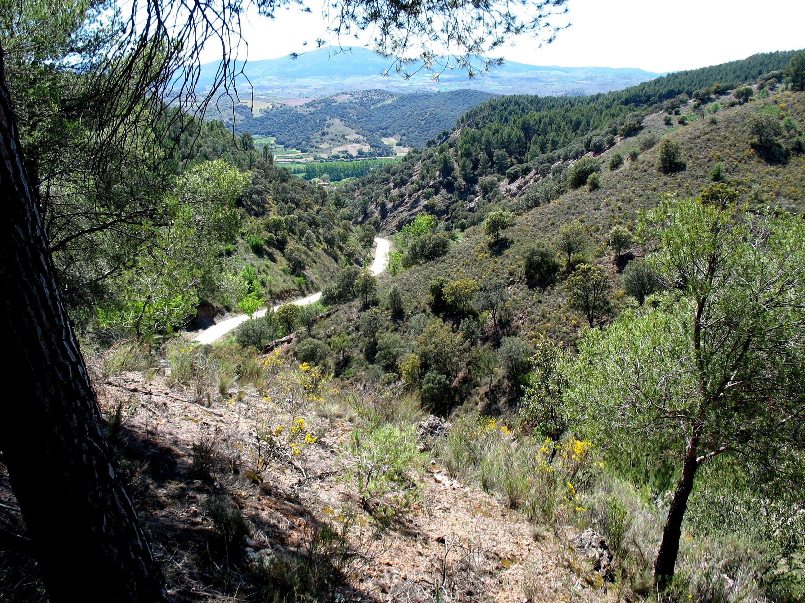 Rambla de Valdemiedes. Sucesiones estratigráficas del Cámbrico Inferior-Medio. Murero (Zaragoza, España). Vista hacia el suroeste.